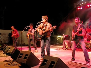 La Guardia en concierto